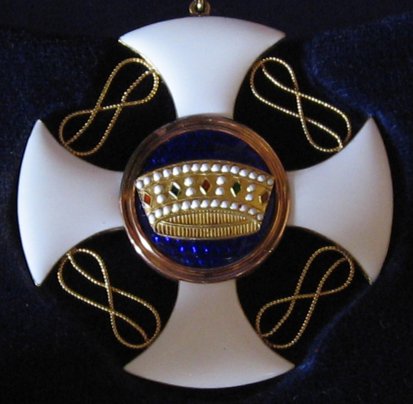 Médaille de commandeur de l'Ordre de la Couronne d'Italie - Photo Gilles Carrier-Dalbion (Seraphin74)